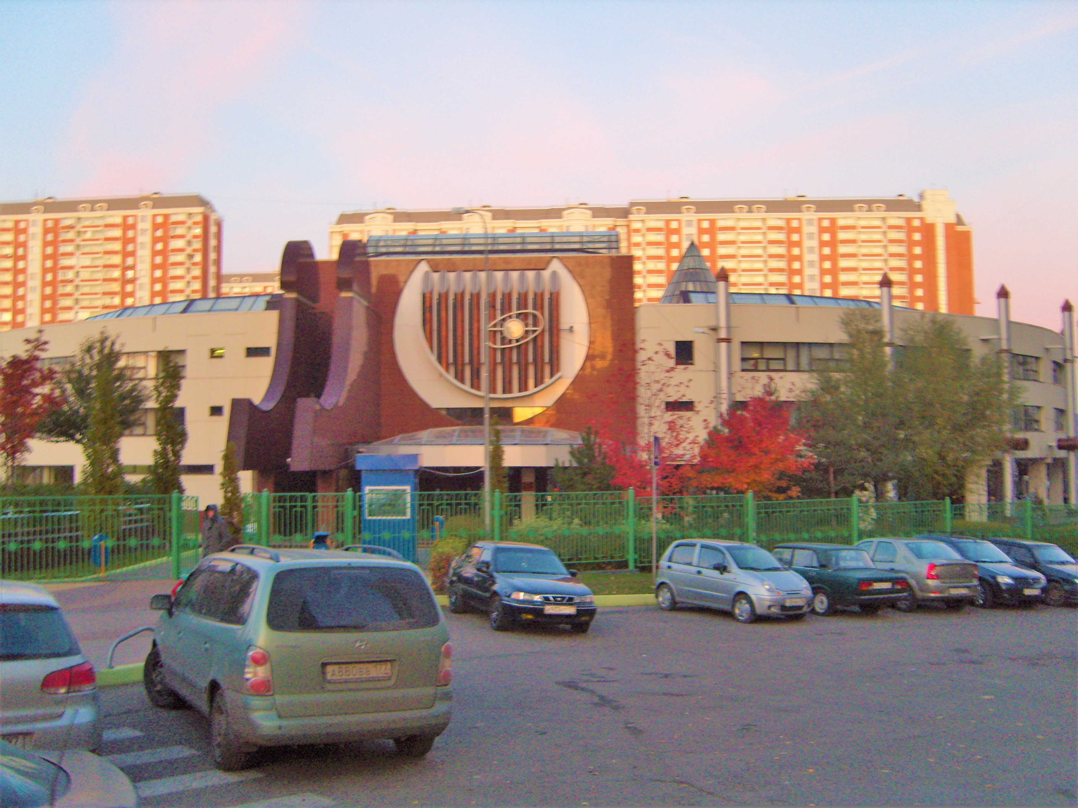 Новая Школа